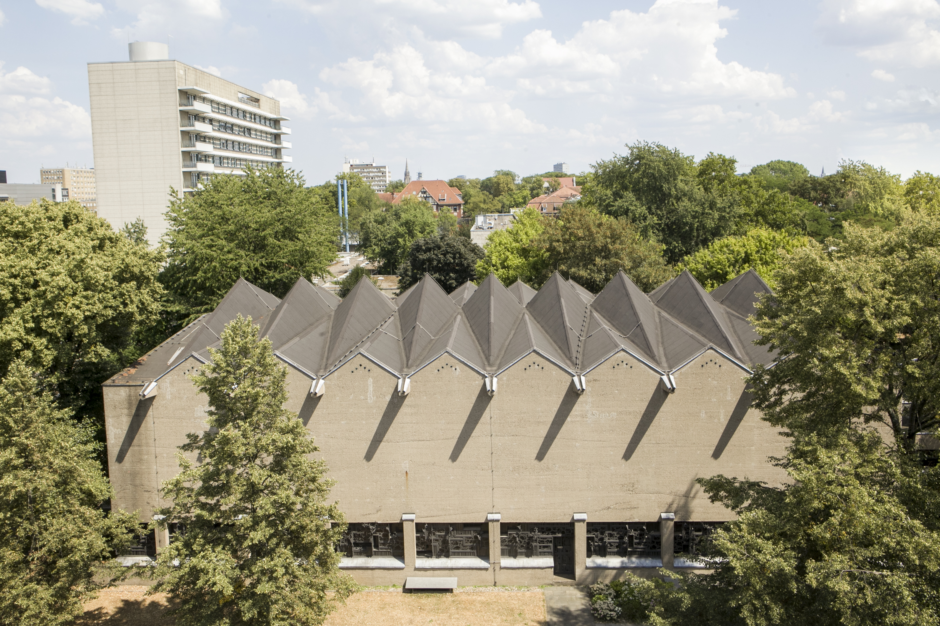 Im Jahr 1958 wurde die Kirche St. Johannes der Täufer von Gottfried Böhm entworfen und 1965 fertiggestellte. Die Kirche ist Teil der Uniklinik Köln.